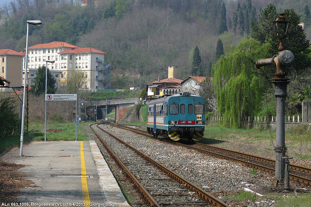 Automootrice diesel ALn 668.1006 delle Ferrovie dello Stato in arrivo a Borgosesia.